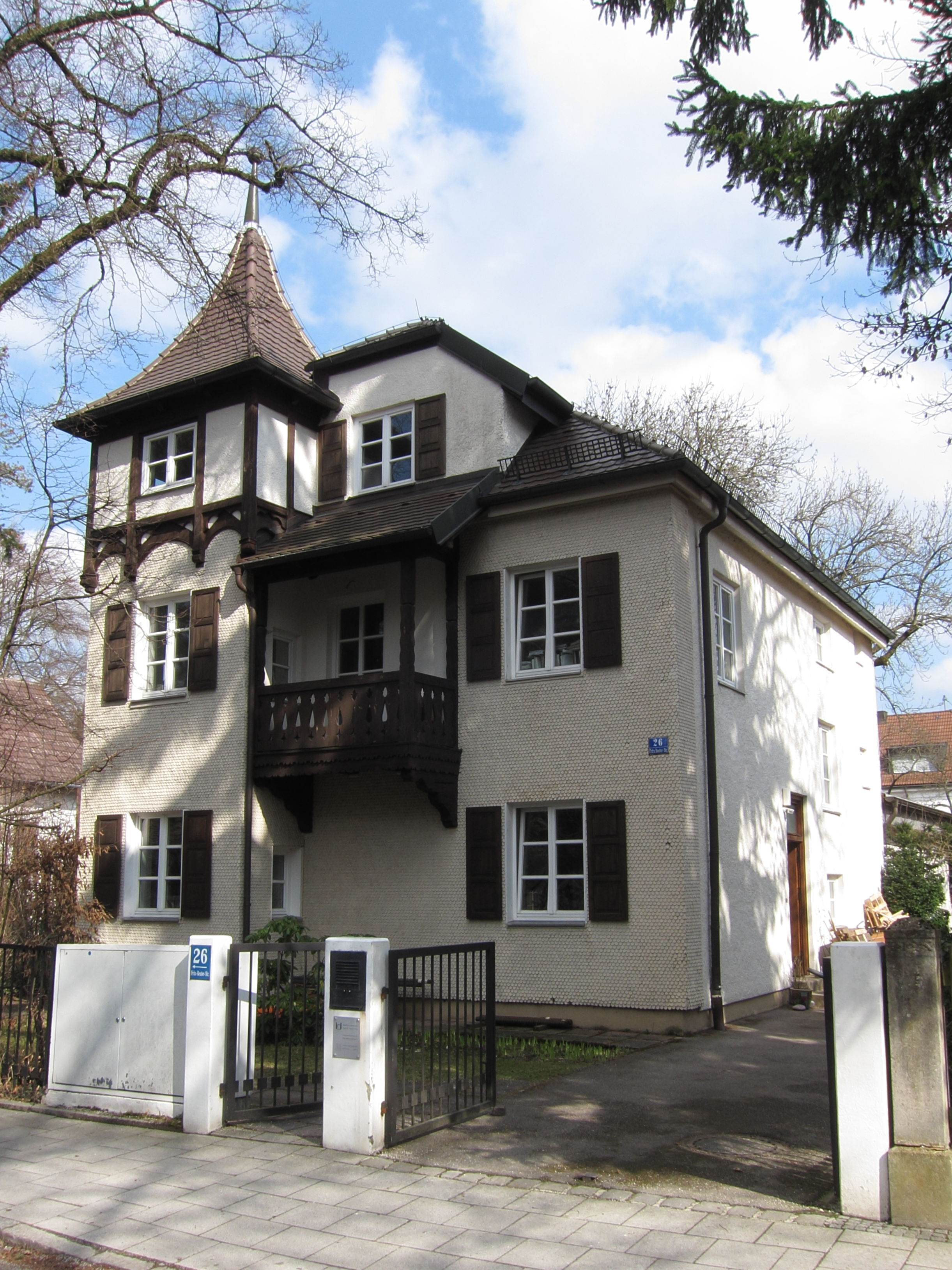 Fritz-Reuter-Straße 26; Malerische Kleinvilla, um 1893, aus dem Büro August Exter.